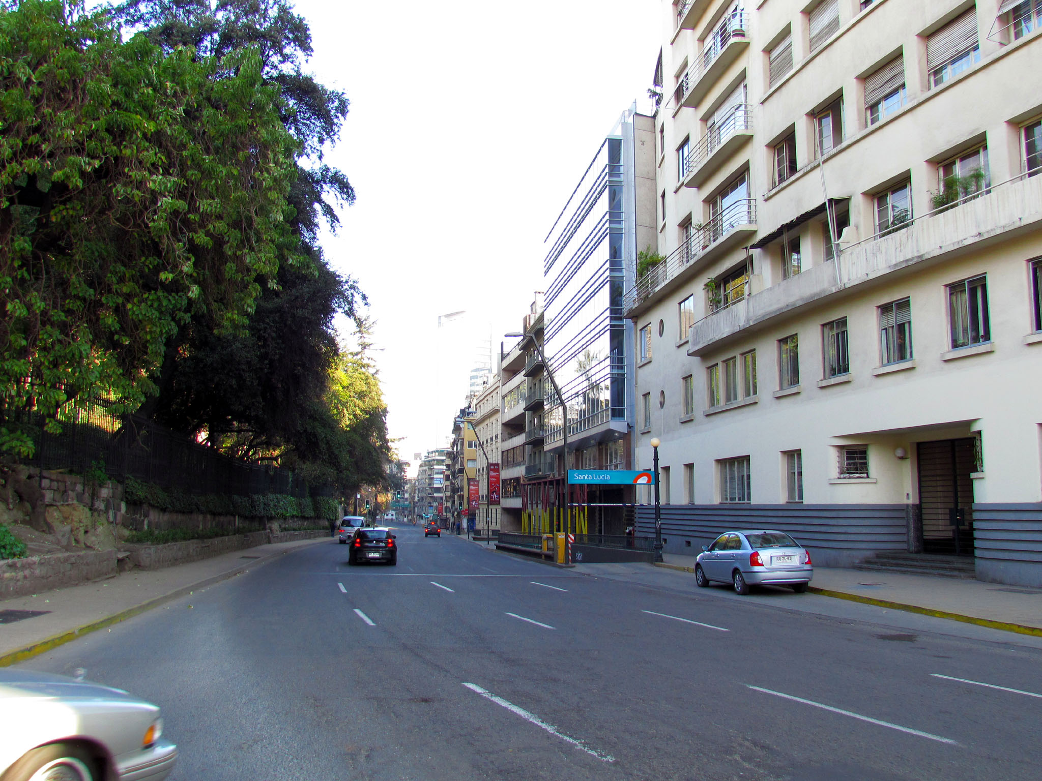 Sta Lucia